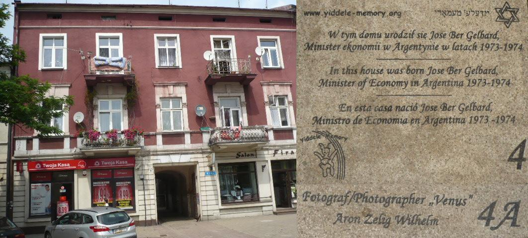 Radomsko. Otwarte Muzeum Żydowskie 4, 4A